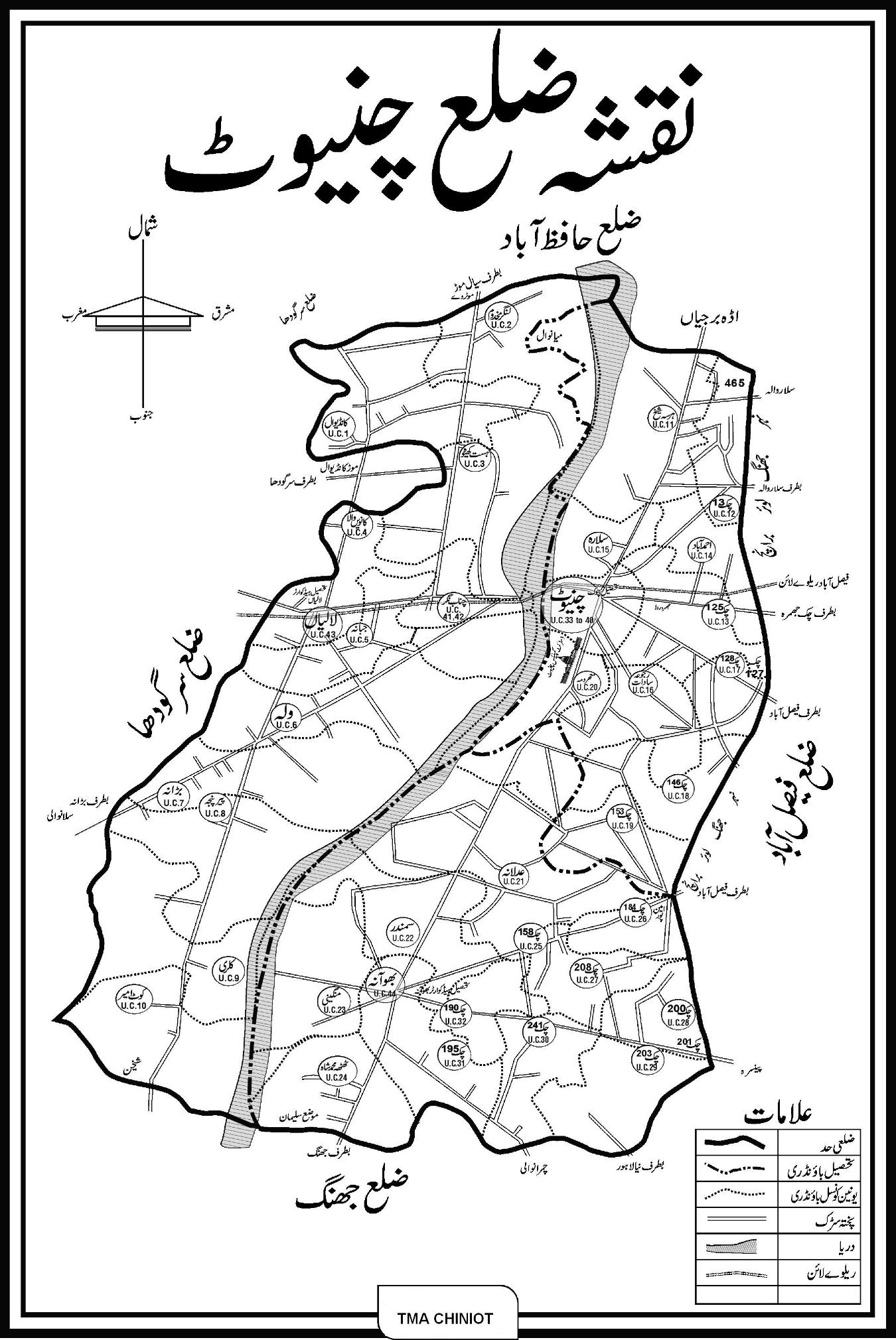 پنجابی: ضلع چنیوٹ دا نقشہ